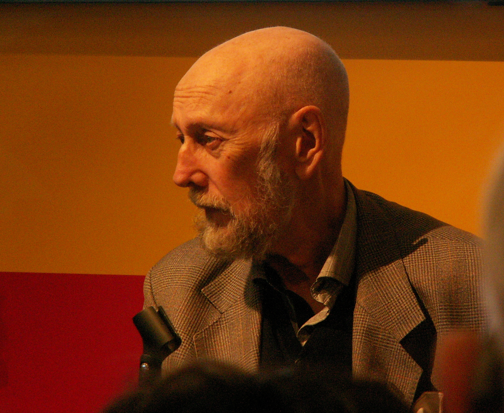 Den svenske författaren Torgny Lindgren